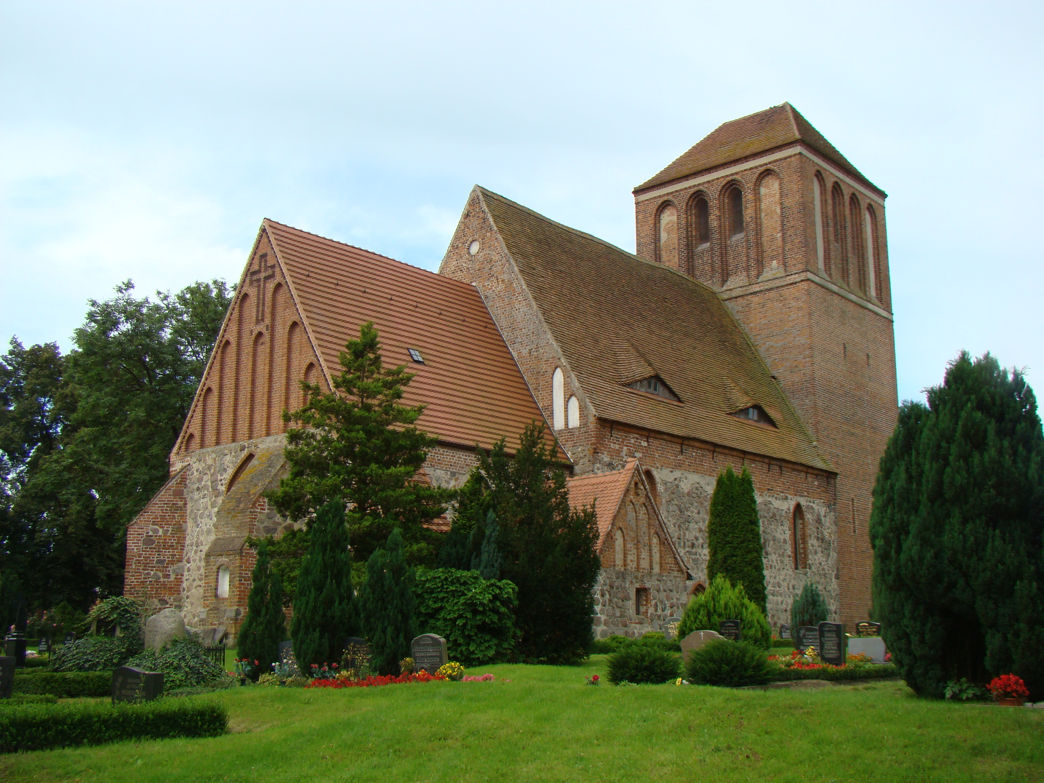 Kirche in Schwinkendorf. Foto: Peter Schmelzle, August 2011